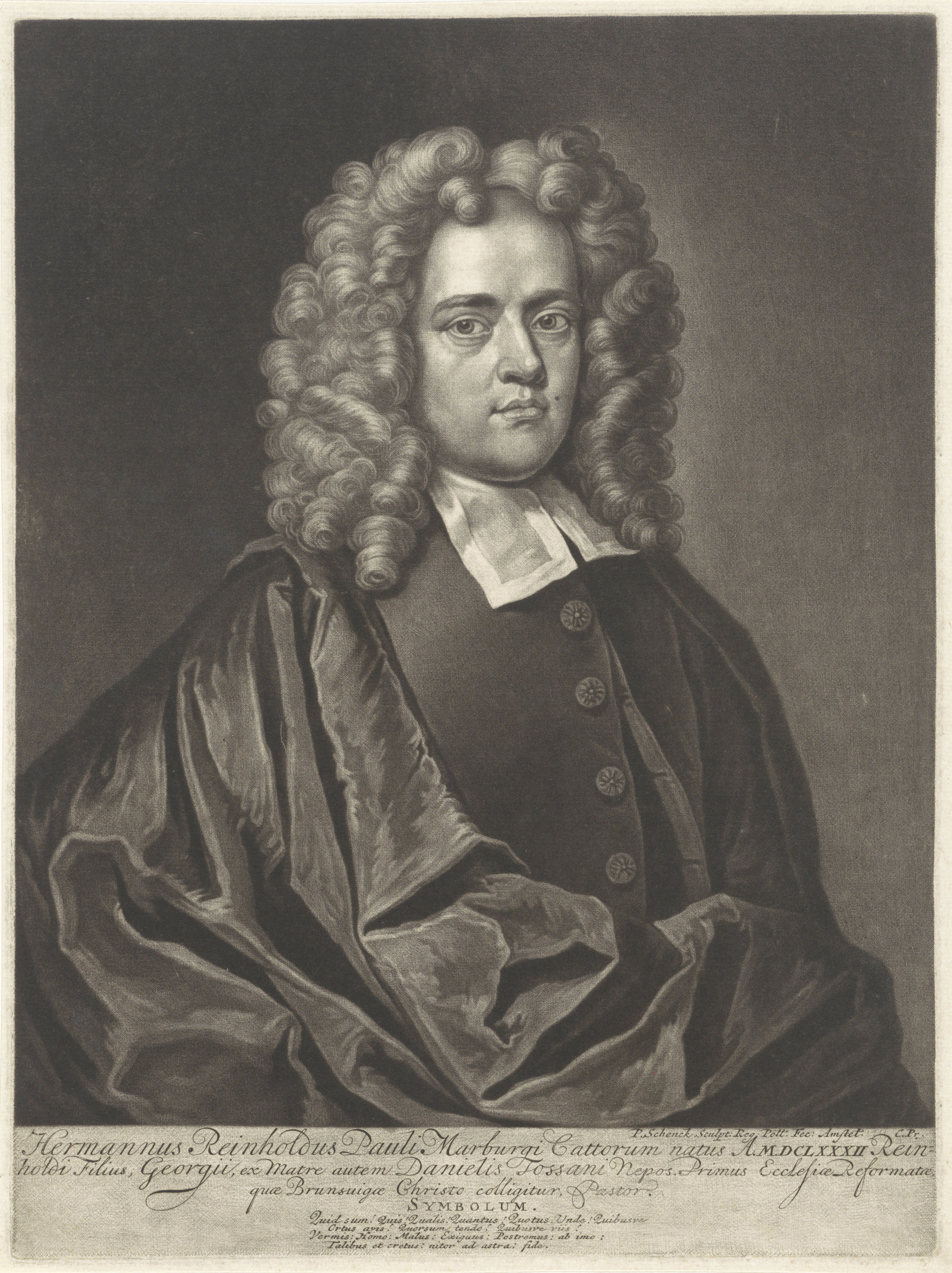 Portret van de predikant Hermann Reinhold Pauli